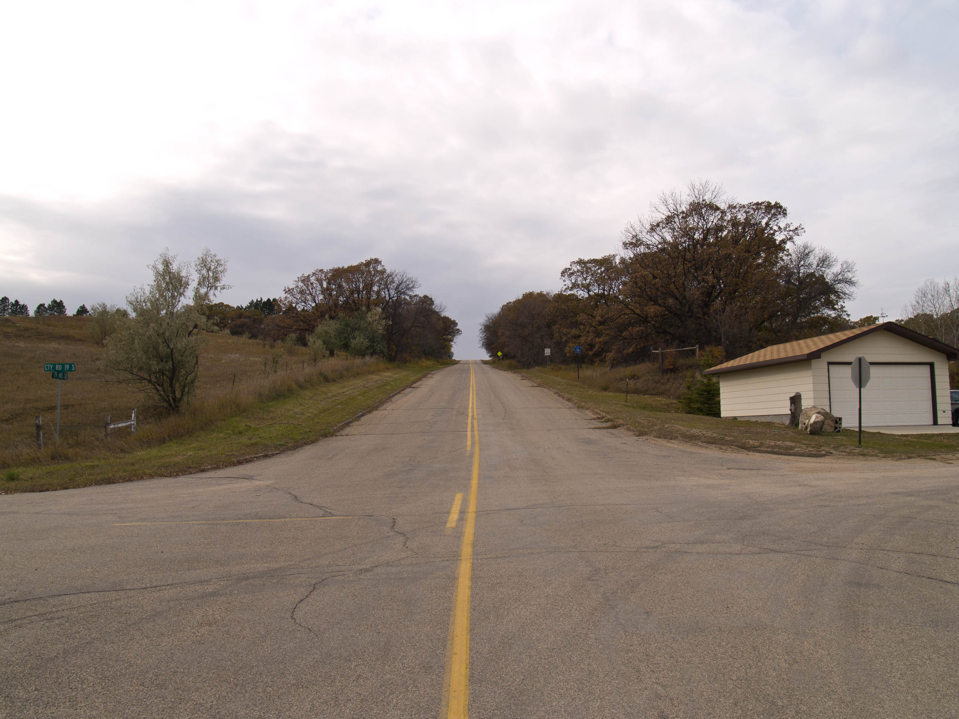 Logan, North Dakota